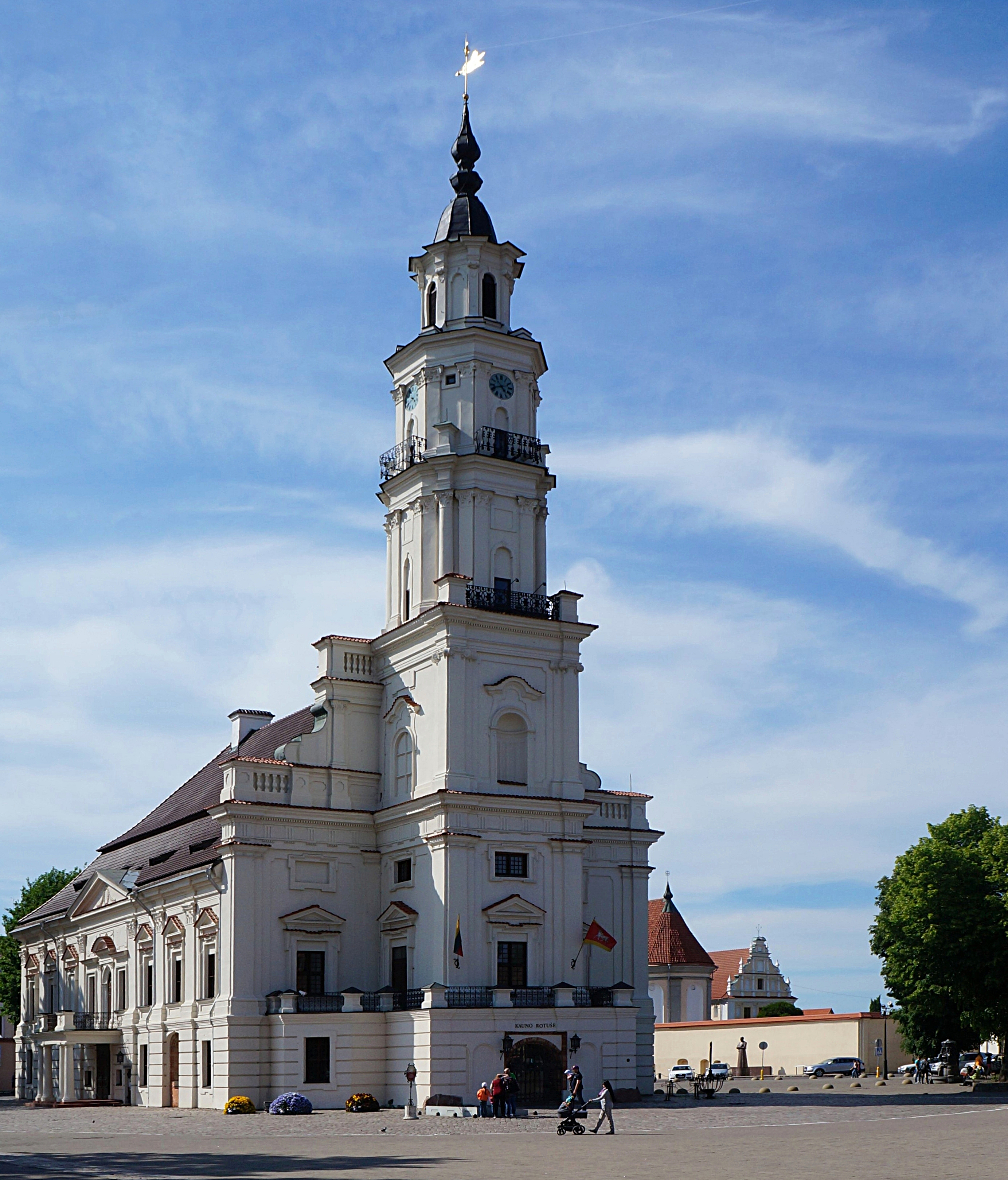 Town Hall, Kaunas, en Lituanie.